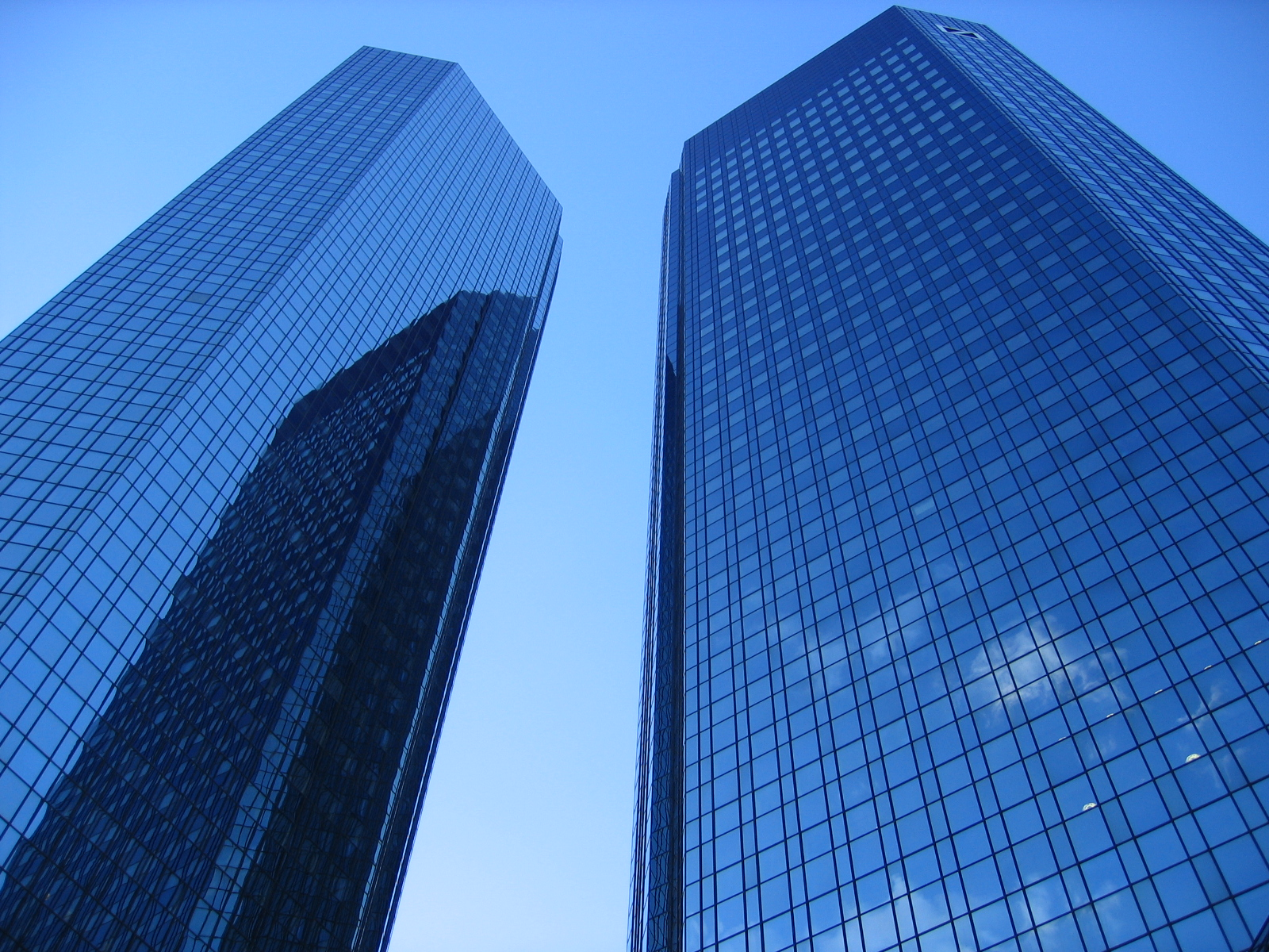 Die Zwillingstürme der Deutschen Bank in Frankfurt am Main